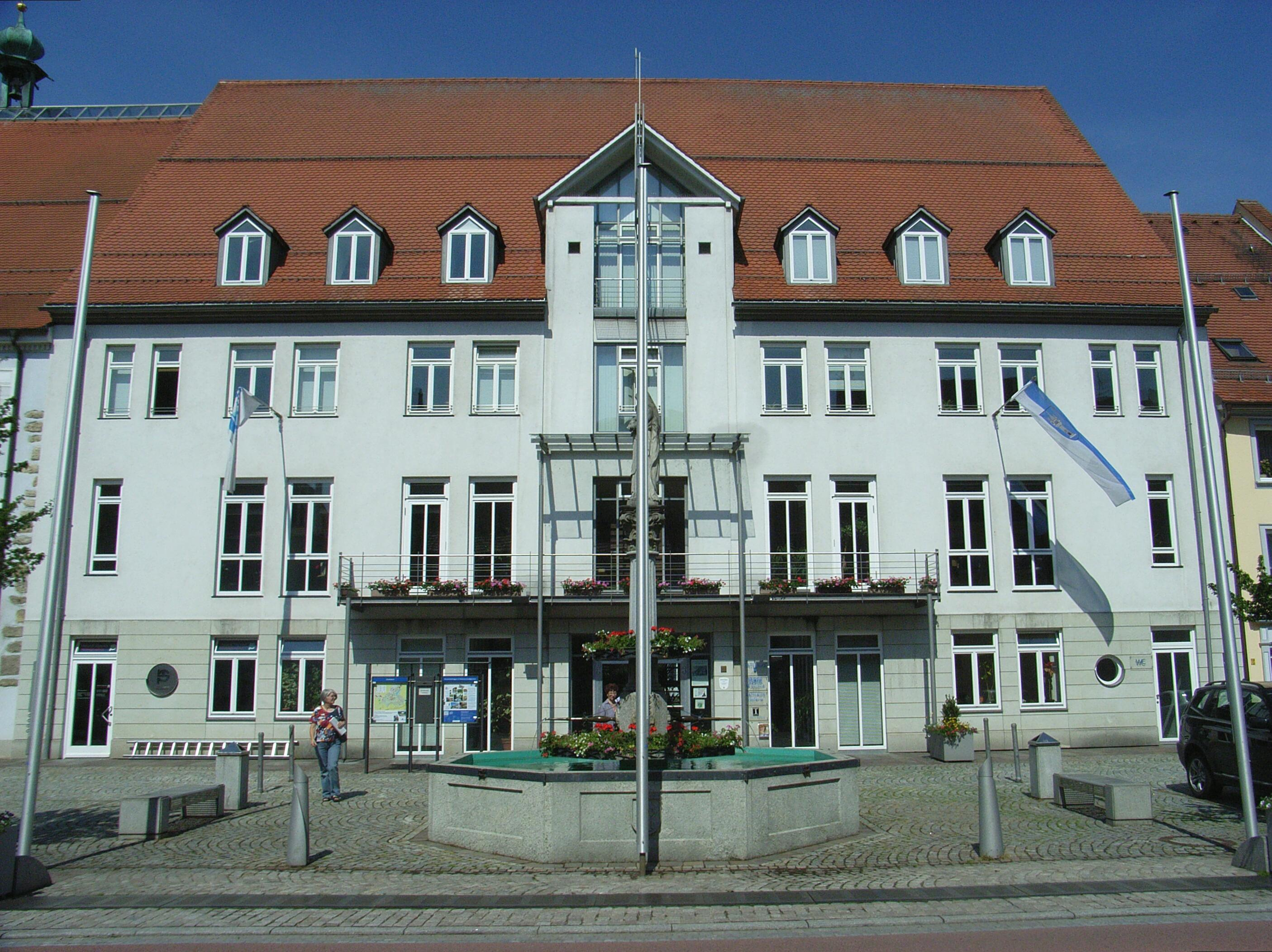 Dieses Bild zeigt das Rathaus in Hüfingen.